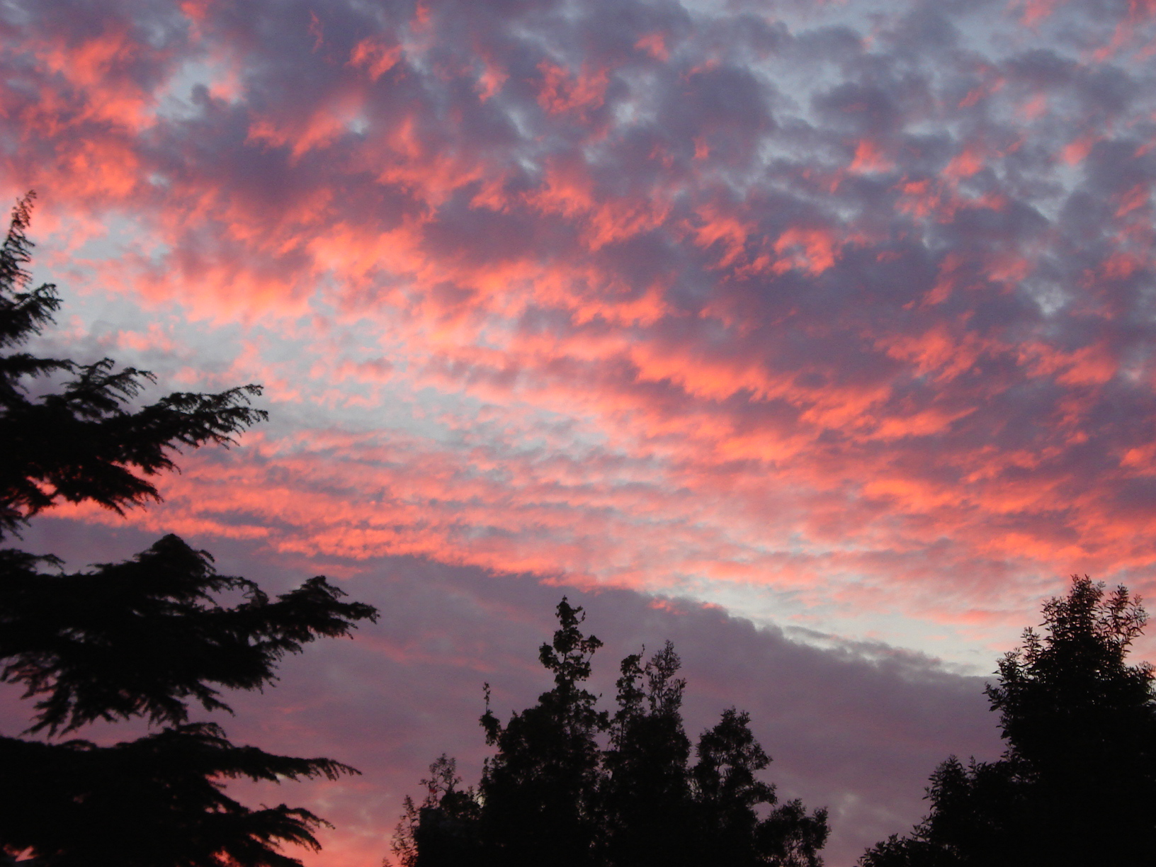 Arrebol desde mi ventana (Dpto. 207)